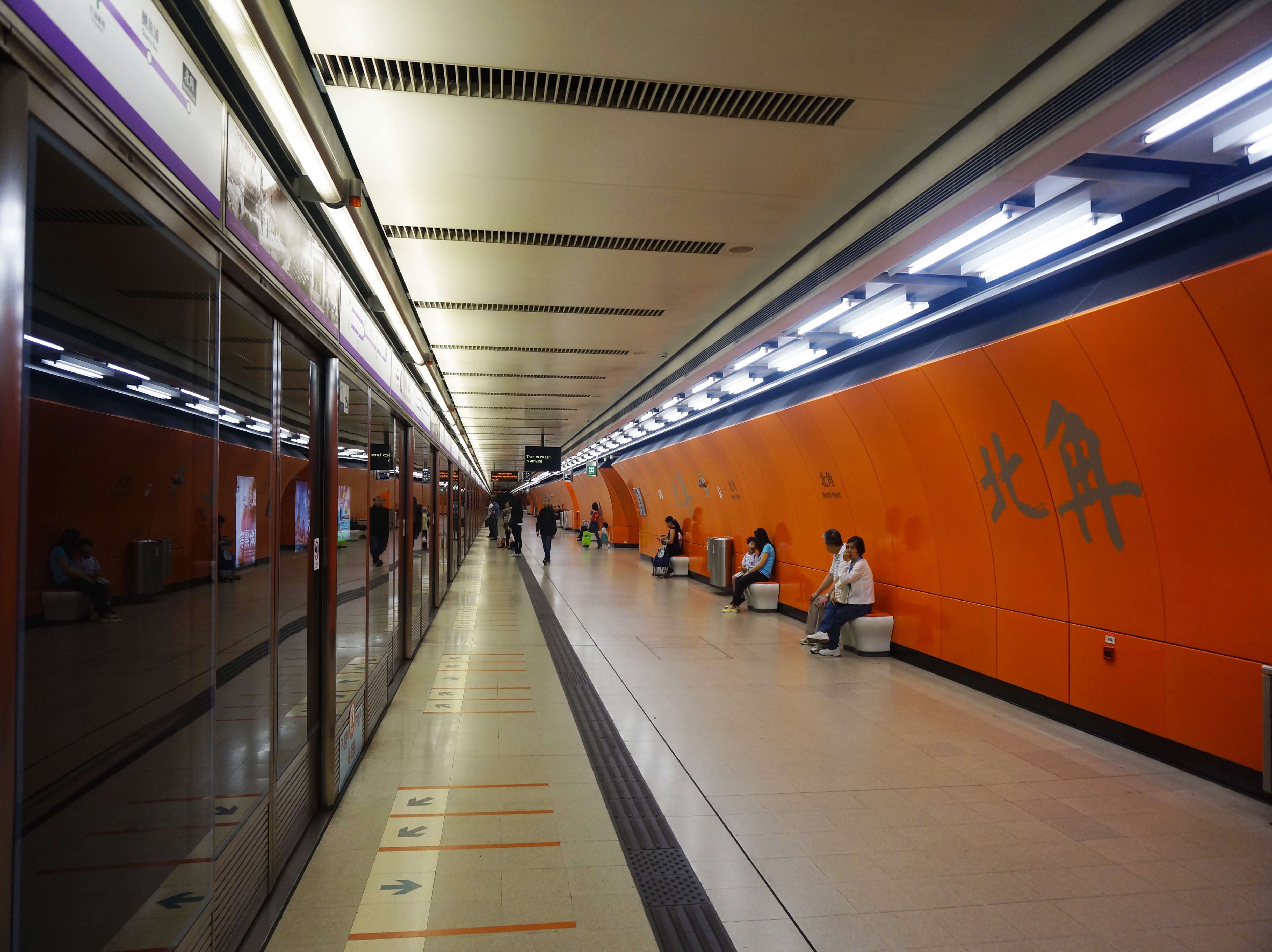 港鐵北角站3號月台